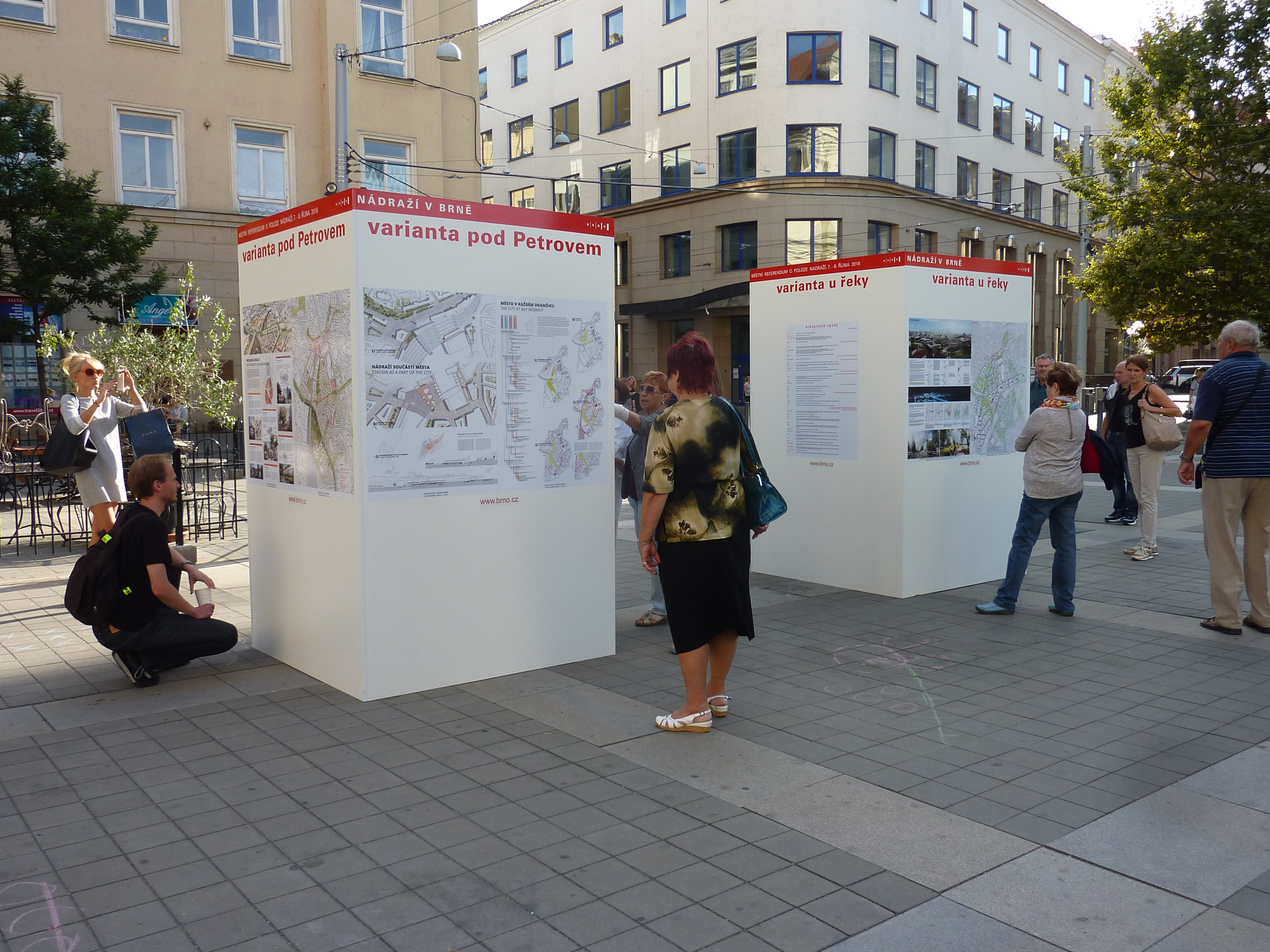 Lidé si prohlížejí dva čtyřboké informační hranoly instalované magistrátem města Brna na Moravském náměstí v Brně v rámci informování obyvatel o místním referendu o poloze hlavního nádraží konaném 7.–8. října 2016.